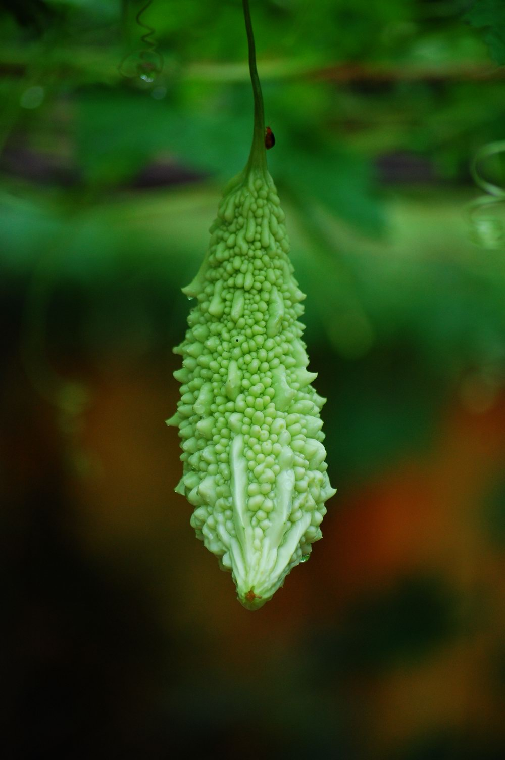 പാവക്ക